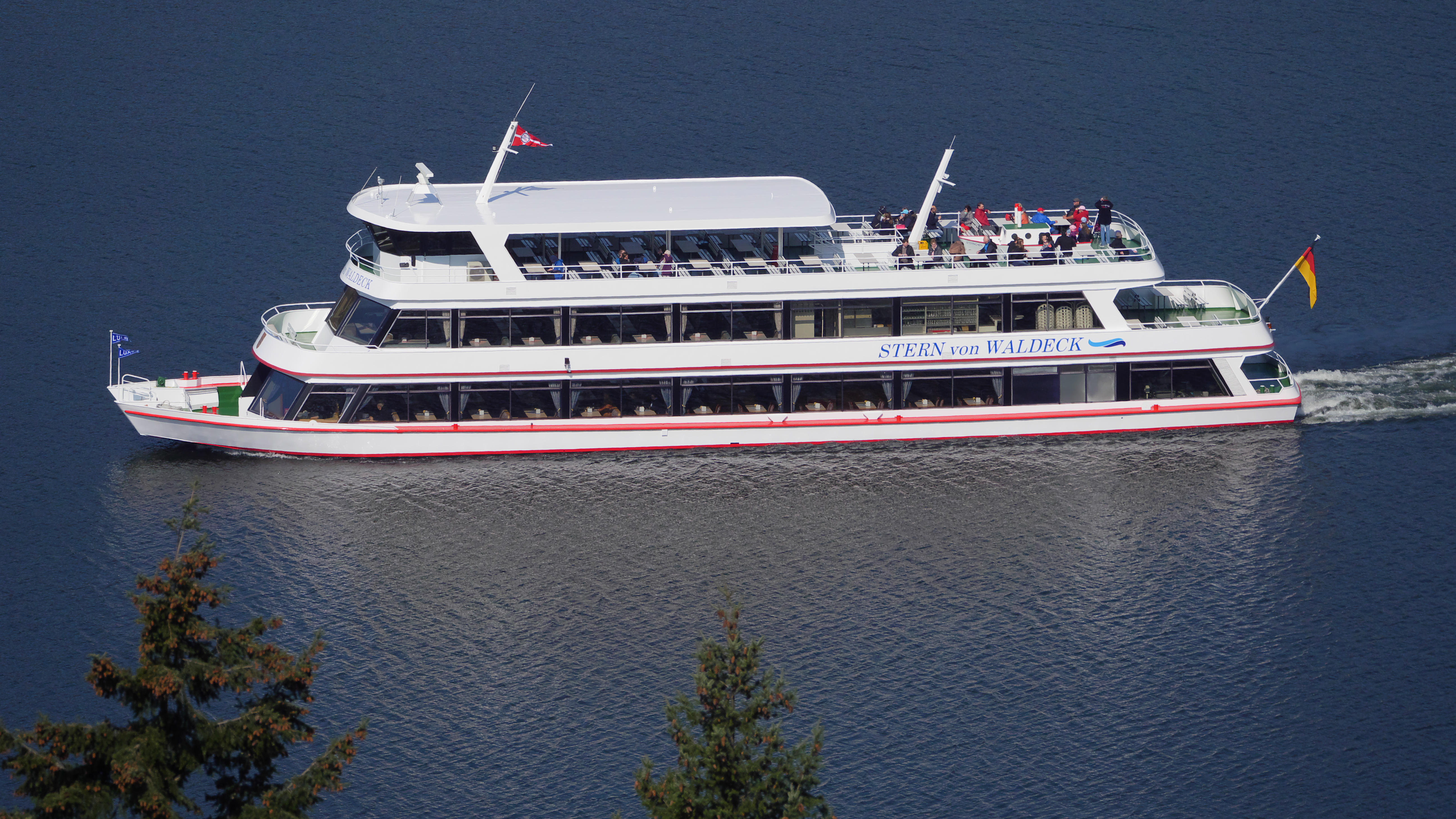 Das Schiff "Stern von Waldeck" auf dem Edersee vom Uhrenkopf aus gesehen